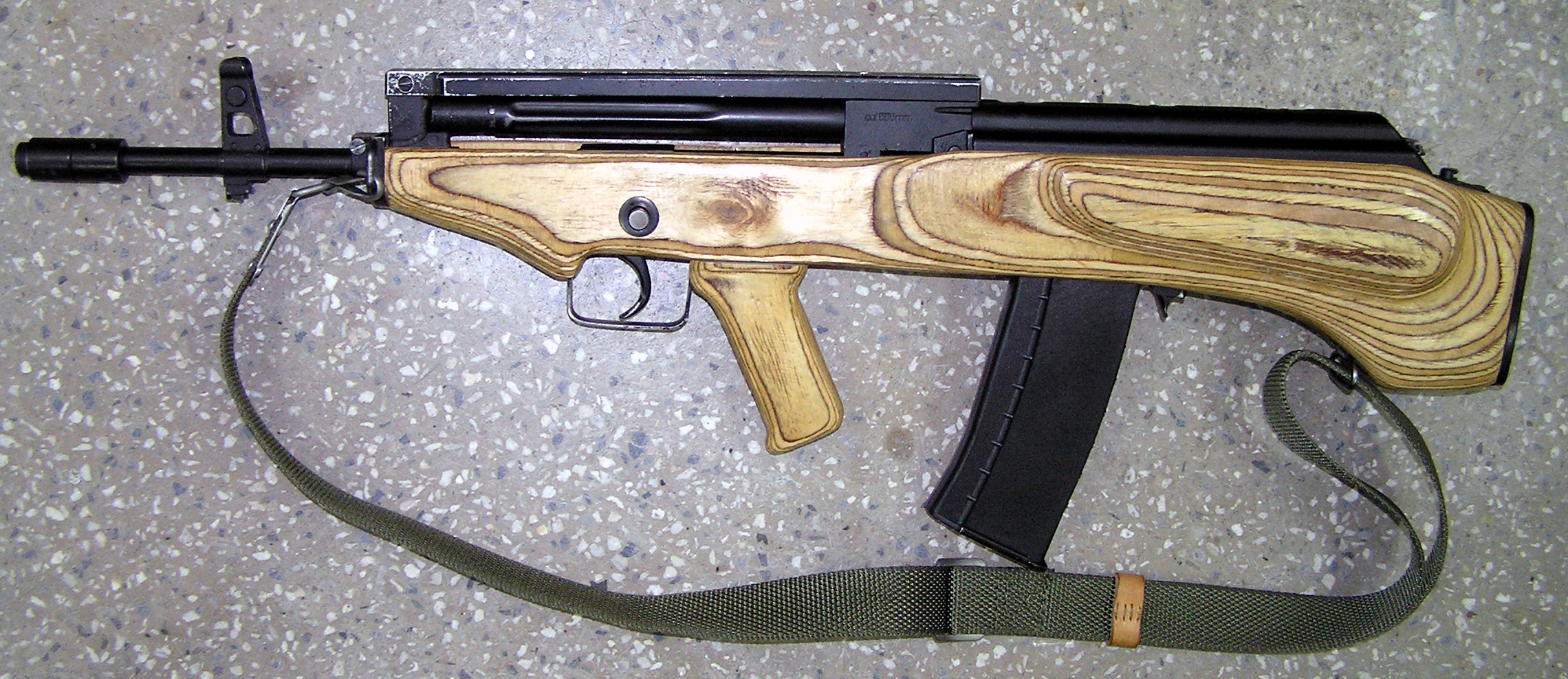 5,56 mm kbk wz.2002 BIN